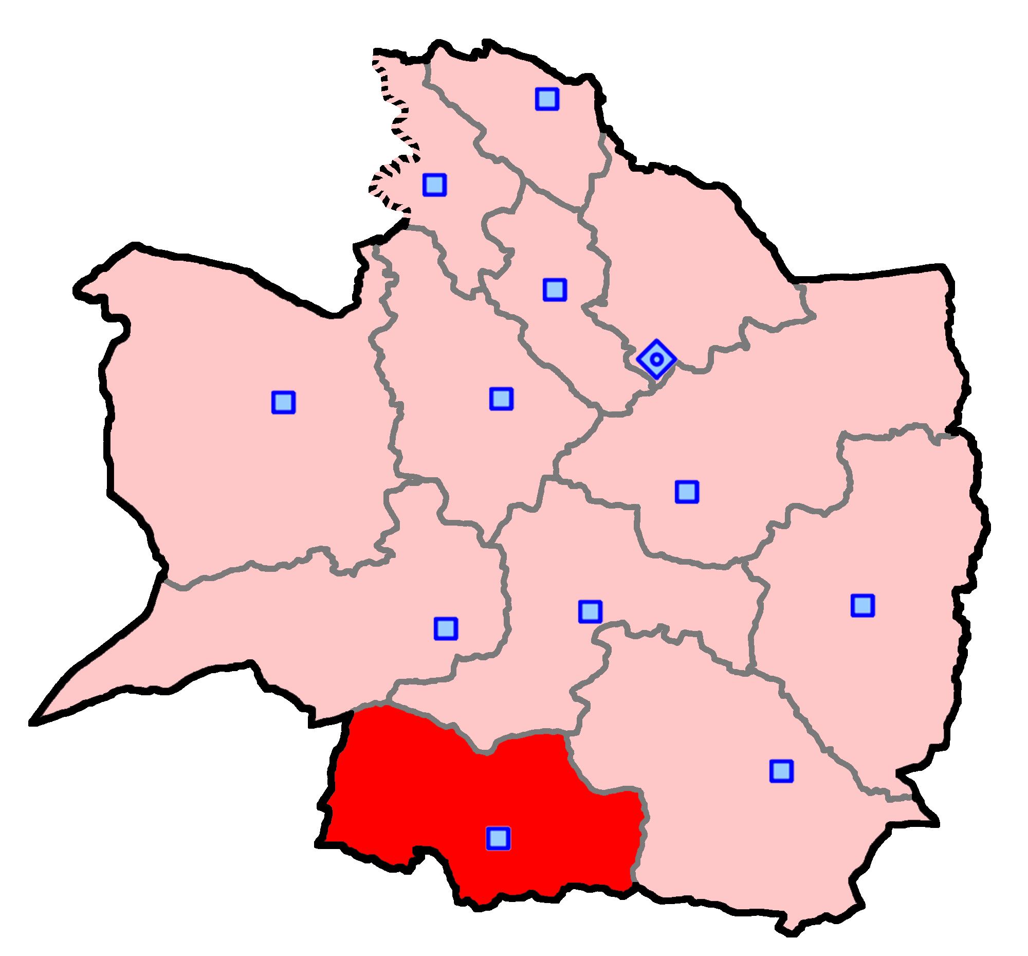 حوزهٔ انتخاباتی گناباد برای انتخابات مجلس شورای اسلامی